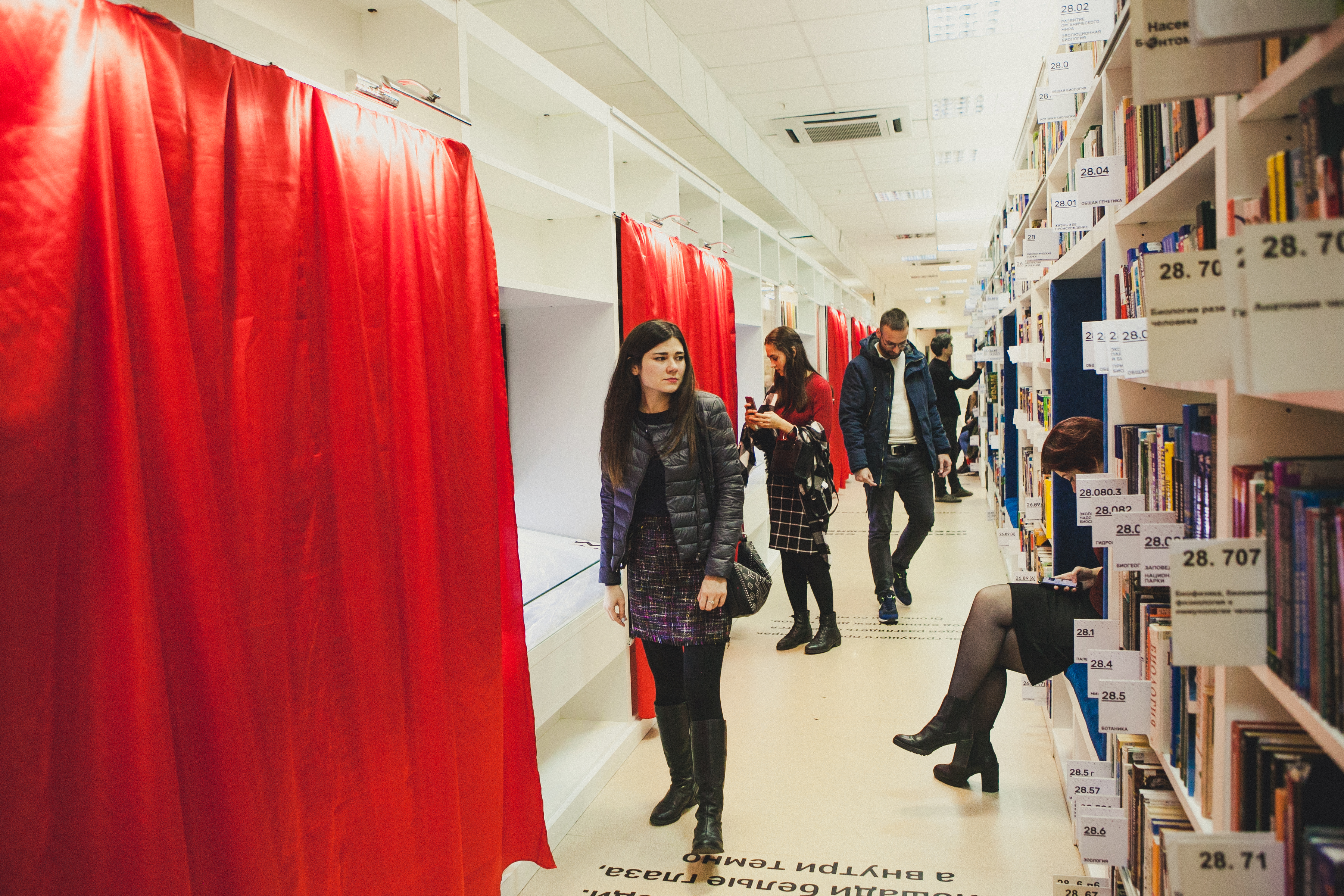 Фестиваль ТвинПикс.txt в библиотеке им. Н.А.Некрасова